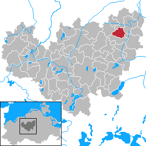 Boddin in Mecklenburg-Vorpommern - District Güstrow